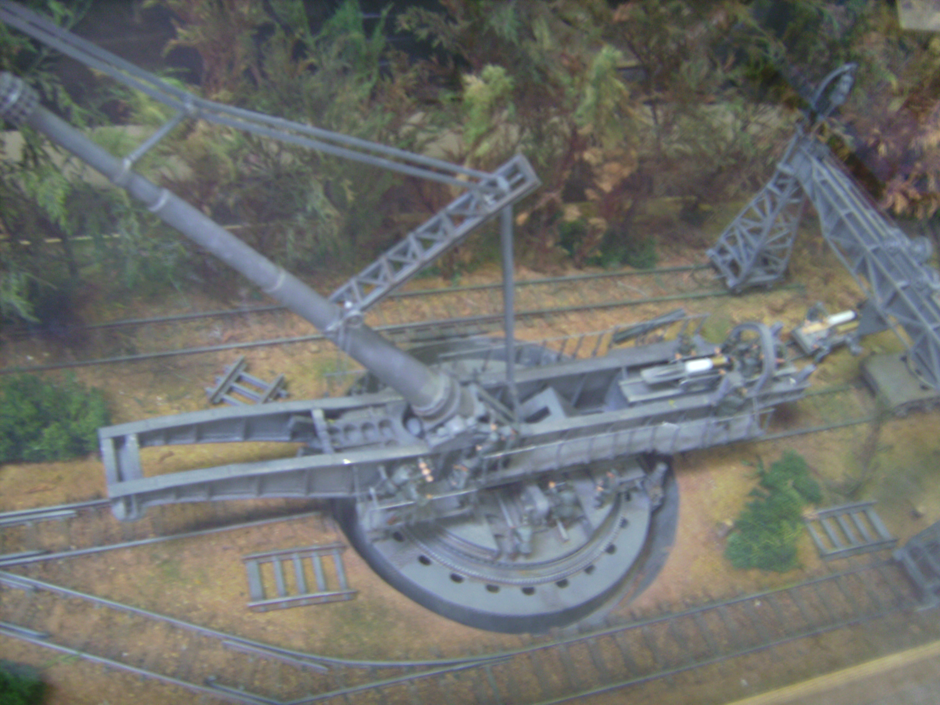 Pariser Ferngeschütz. Modell in der Wehrtechnischen Studiensammlung,Koblenz.